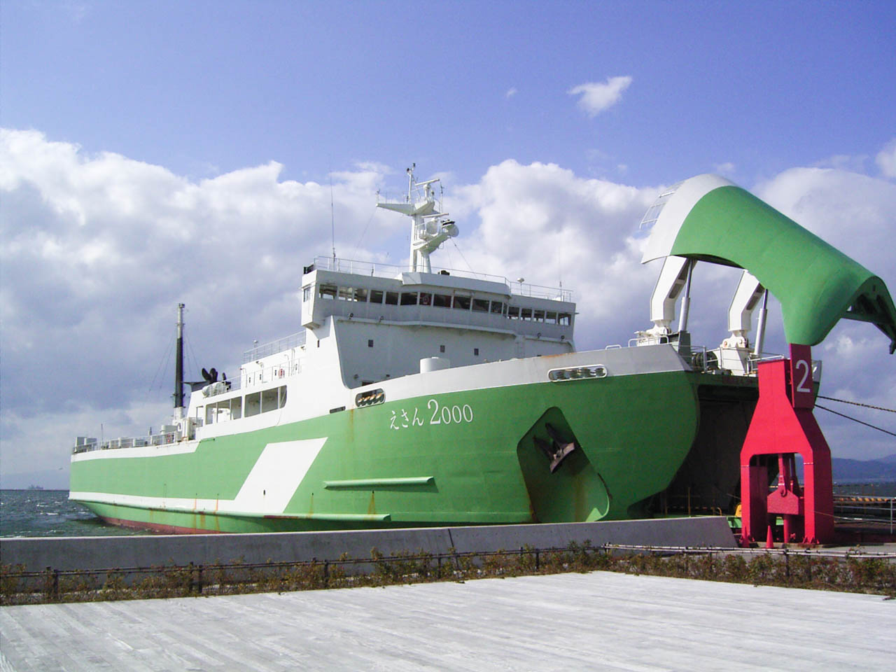 函館港フェリーターミナルに接岸中の道南自動車フェリー「えさん2000」、2008年10月11日撮影。